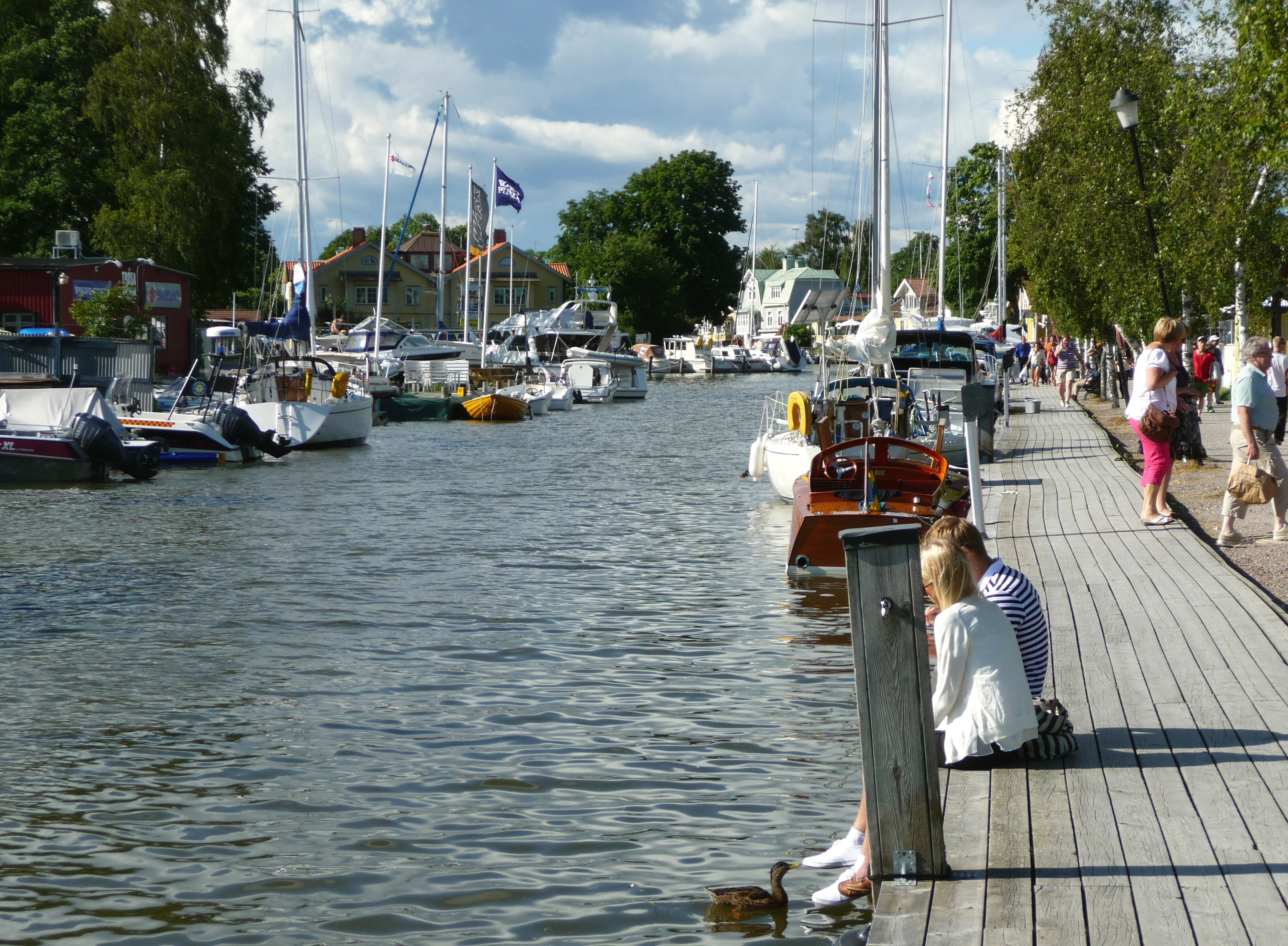 Trosa gästhamn